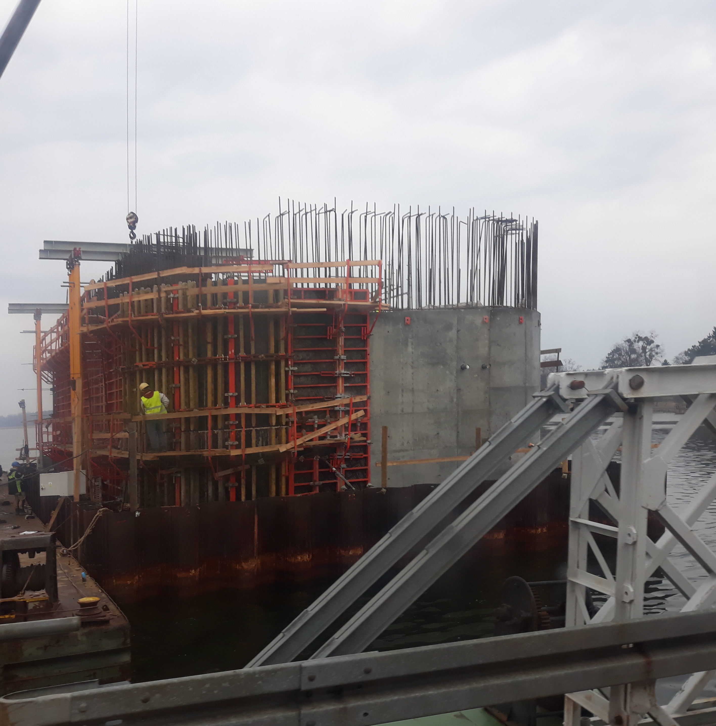 Martwa Wisła między Wiślinką a Sobieszewem. Budowa mostu zwodzonego, podpora po stronie Wiślinki